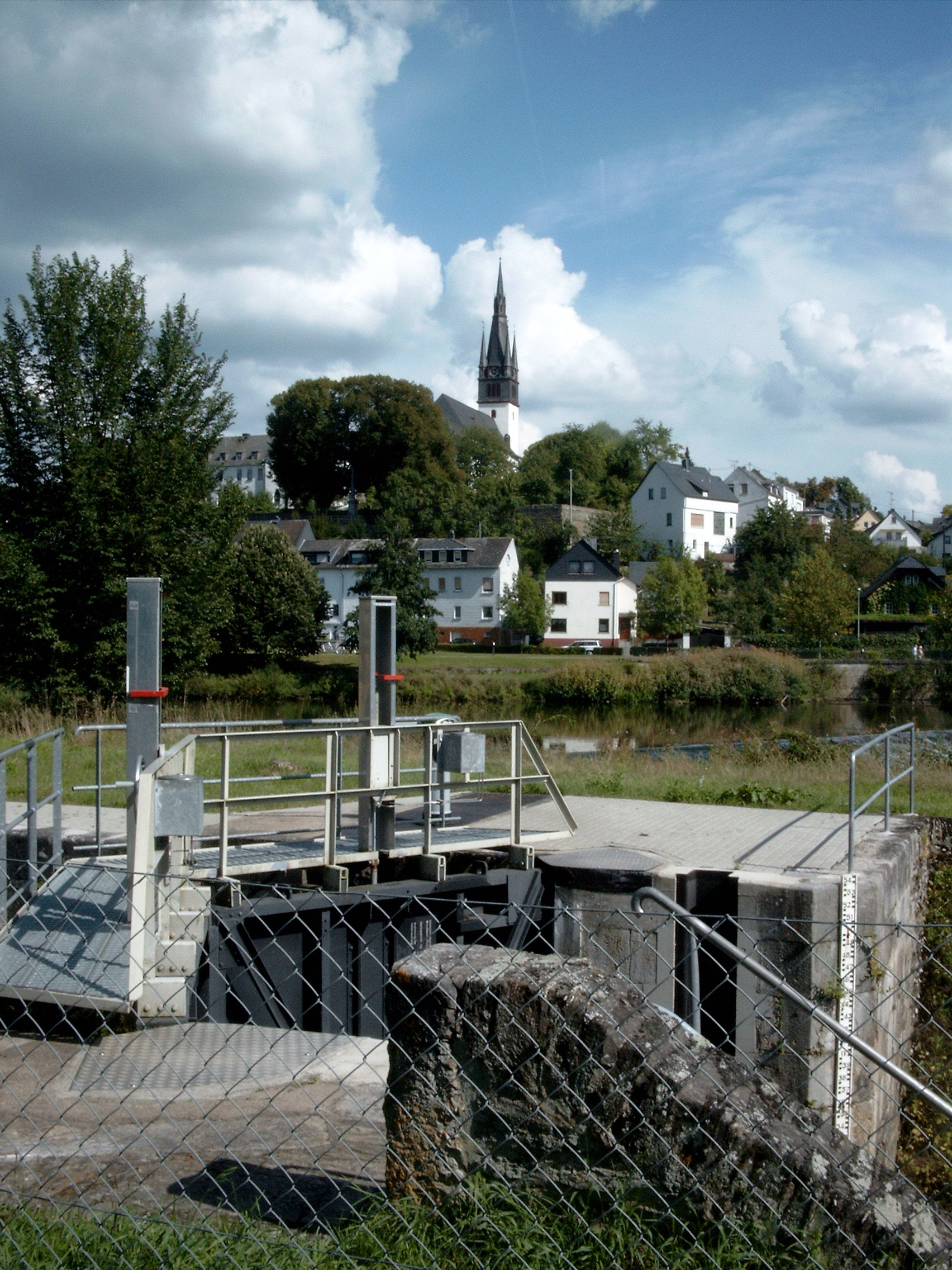 Villmar, Stadtbild mit Lahnschleuse